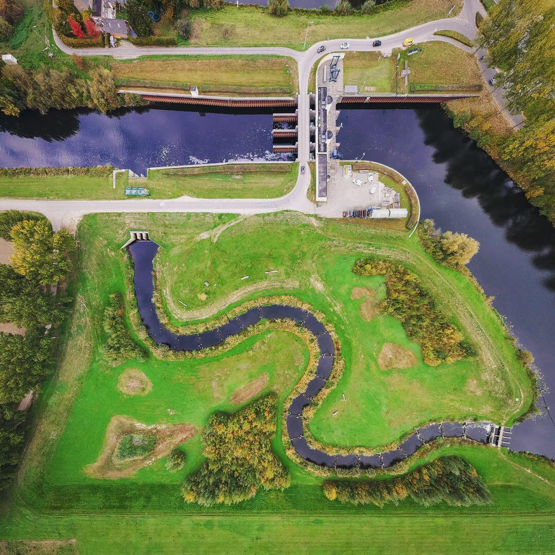 Vispassage in de Dieze bij spuitsluis Crèvecoeur.